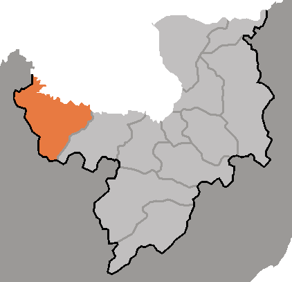 Map of Kimhyongjik, Ryanggan-do, DPRK, 2006